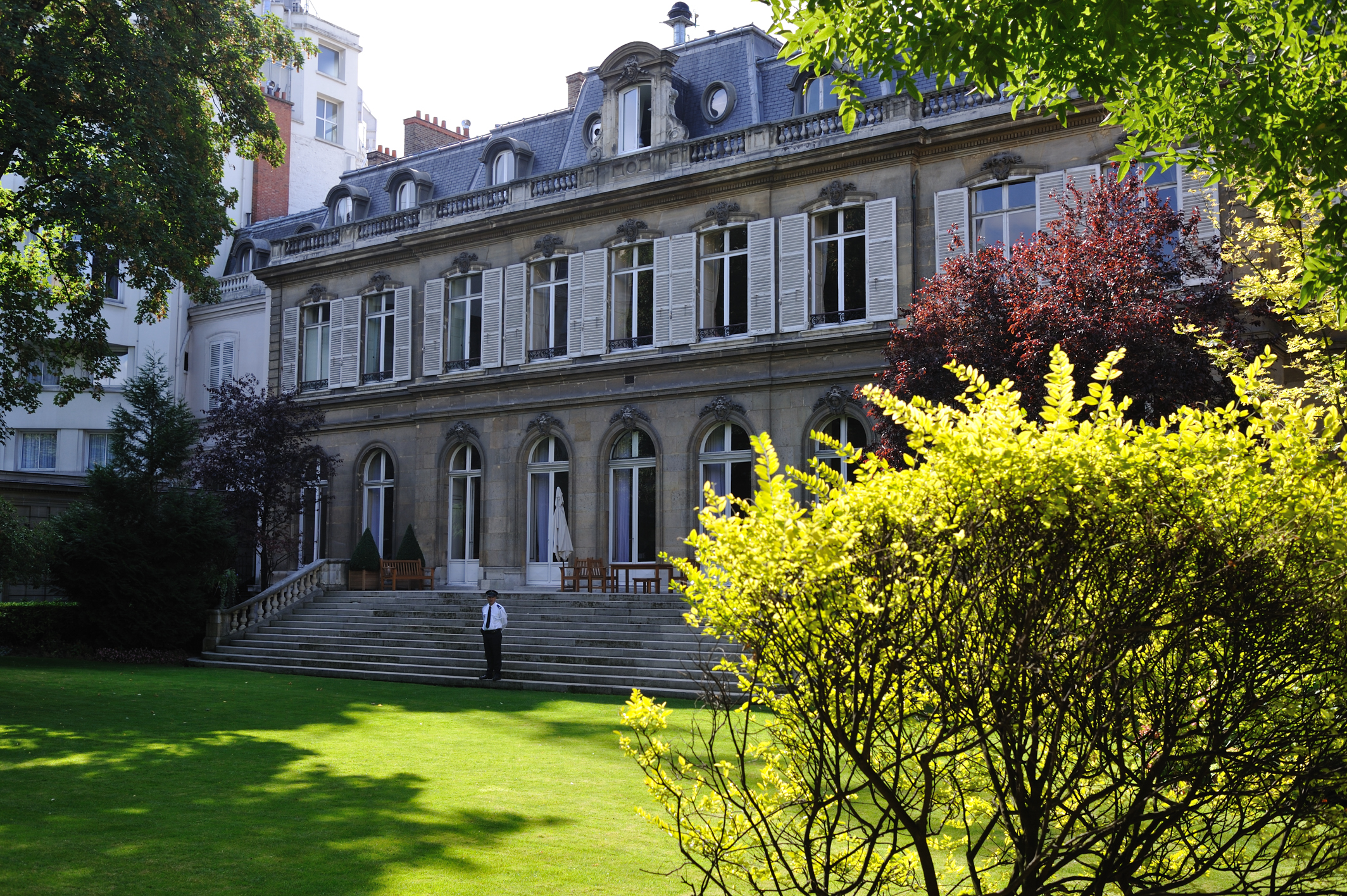 Hôtel de Beauvau, siège du ministère de l'Intérieur, place Beauvau, Paris, FrancePhoto prise à l'occasion des journées européennes du patrimoine 2010